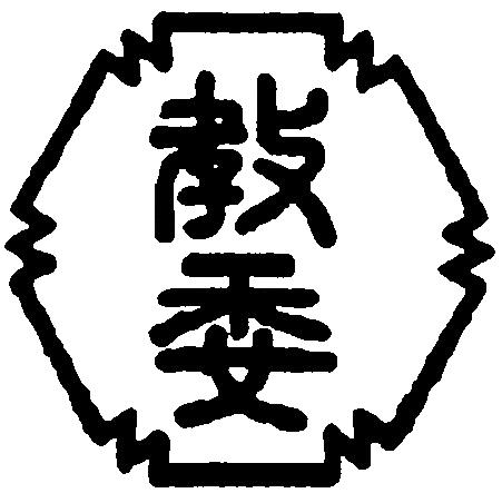 山梨県教育庁